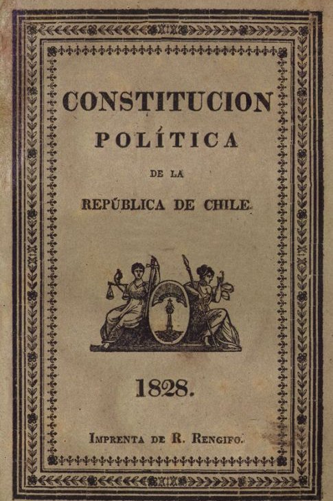 Portada de un ejemplar de la Constitución de la República de Chile de 1828. Santiago: Imprenta de R. Rengifo, 1828